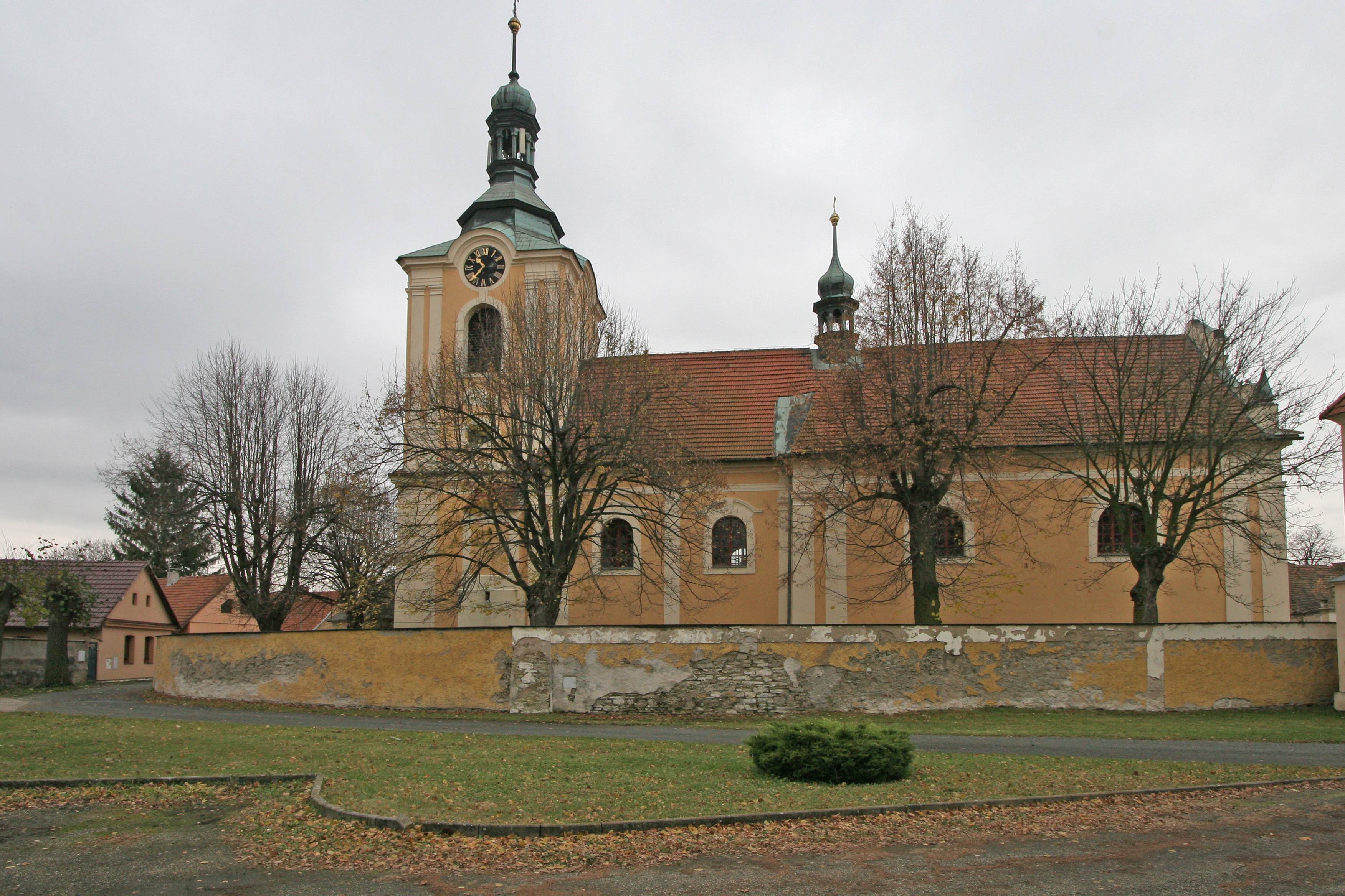 Kostel sv. Václava (Chotusice), Chotusice